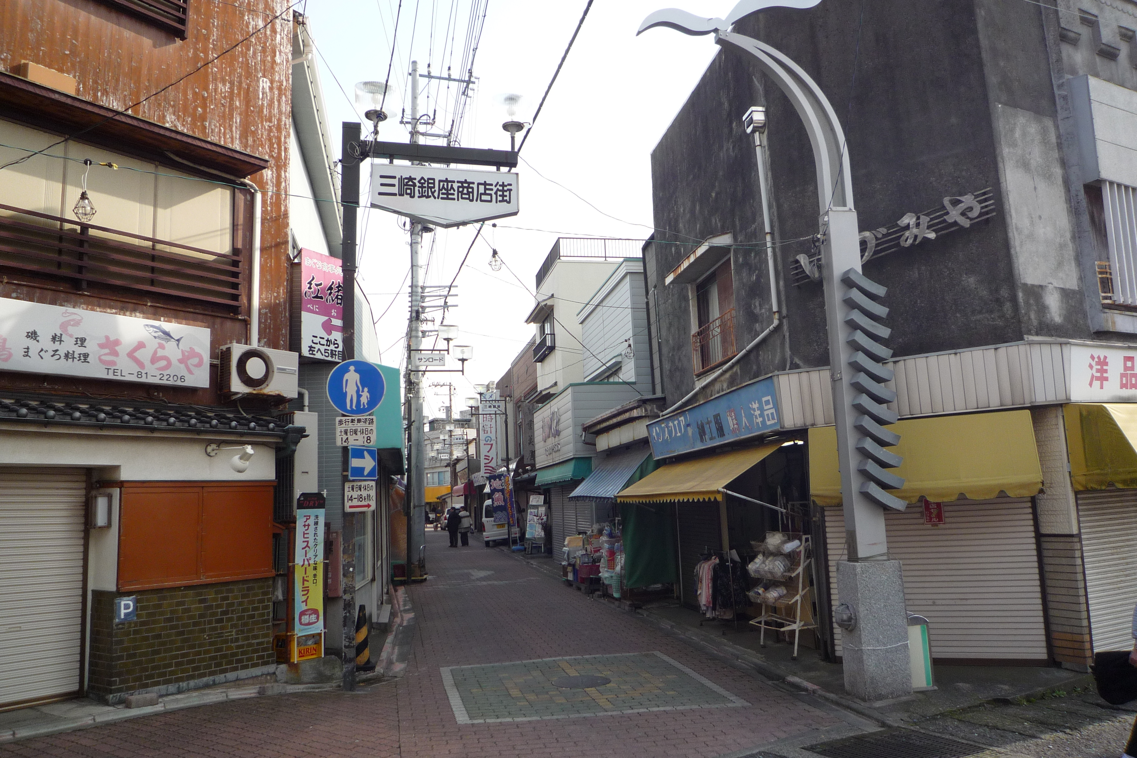 三崎の町並みを写した写真。